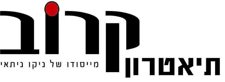 לוגו תיאטרון קרוב מיסודו של ניקו ניתאי